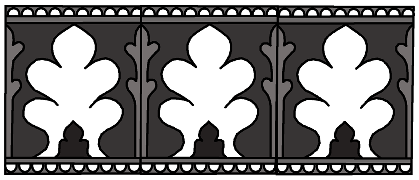 Керамичен фриз от манастира Паталейна, 9-10 век, реконструкция